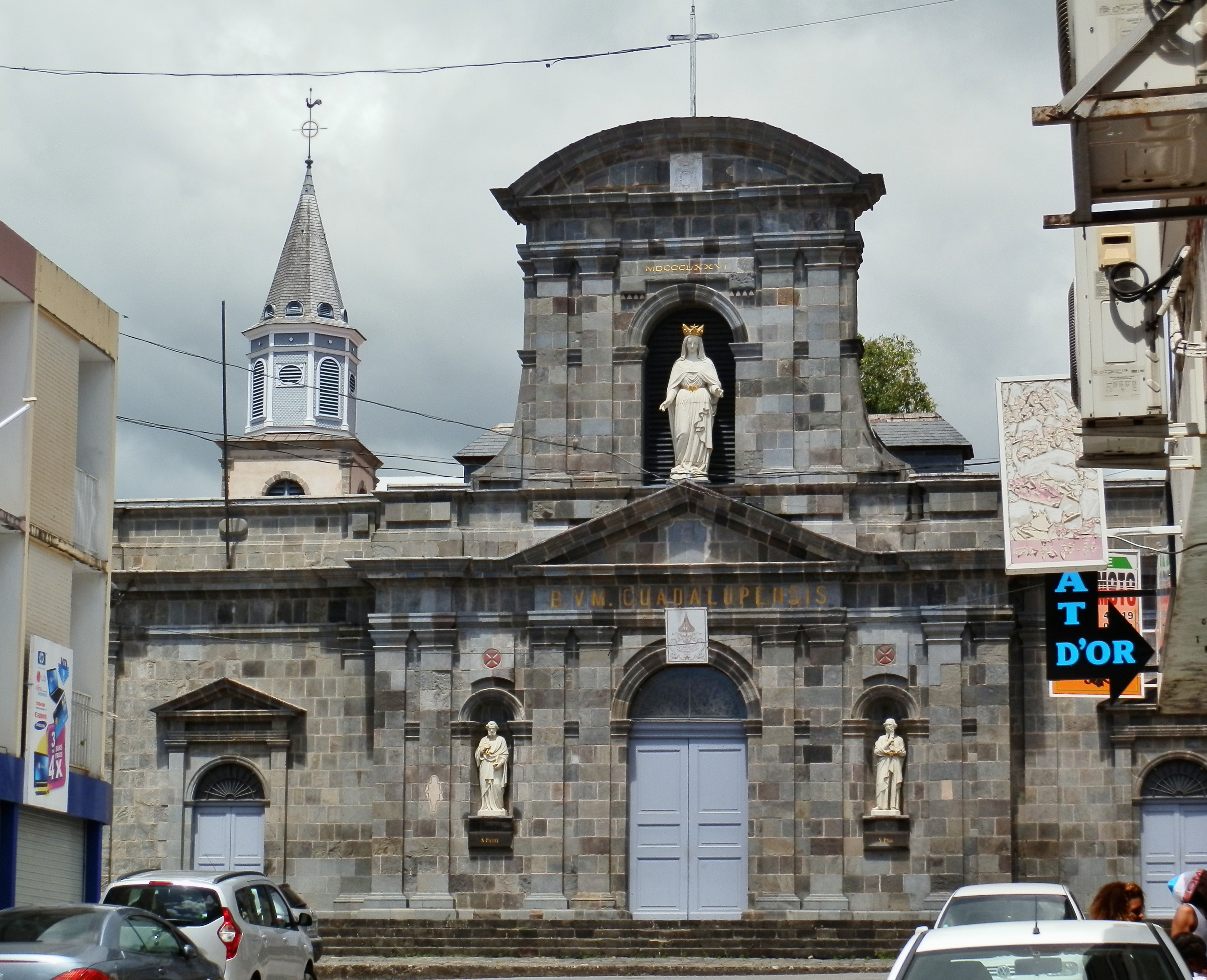 Cathédrale Notre-Dame de Guadeloupe, Classé, 1975 et 2006) .